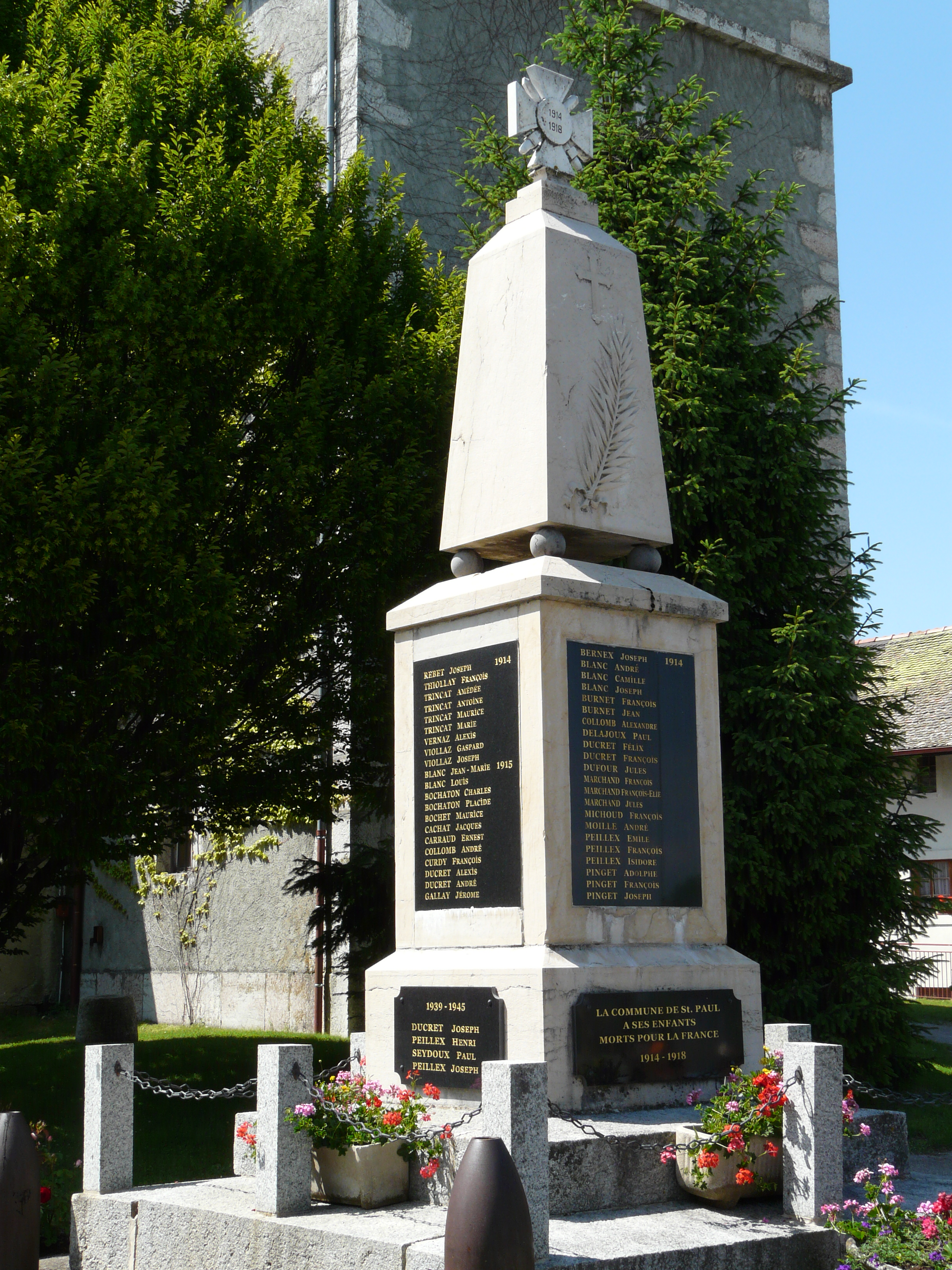 Monument aux morts de Saint-Paul-en-Chablais (Haute-Savoie)